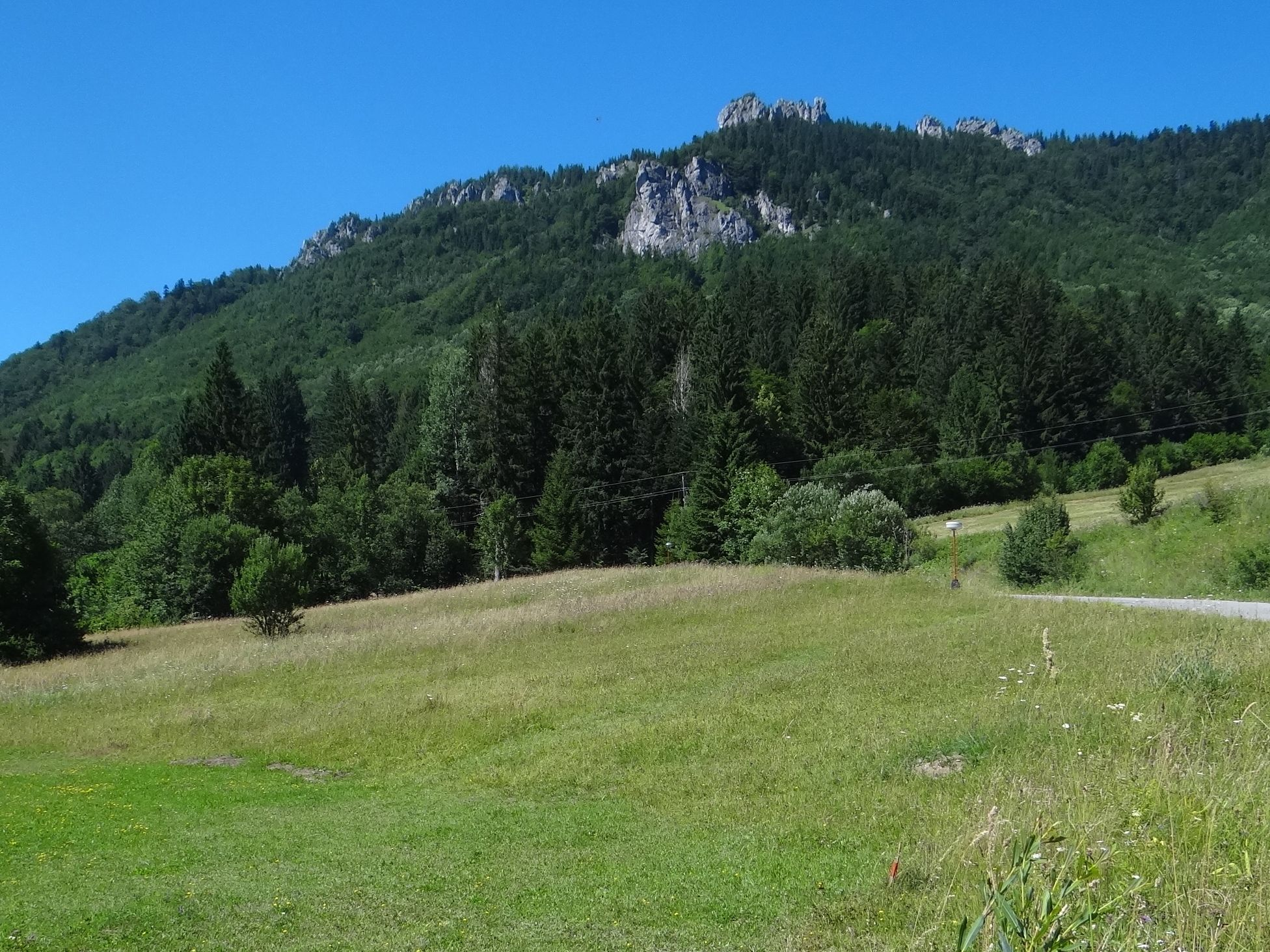 Boboty. Widok z Novego Dvoru